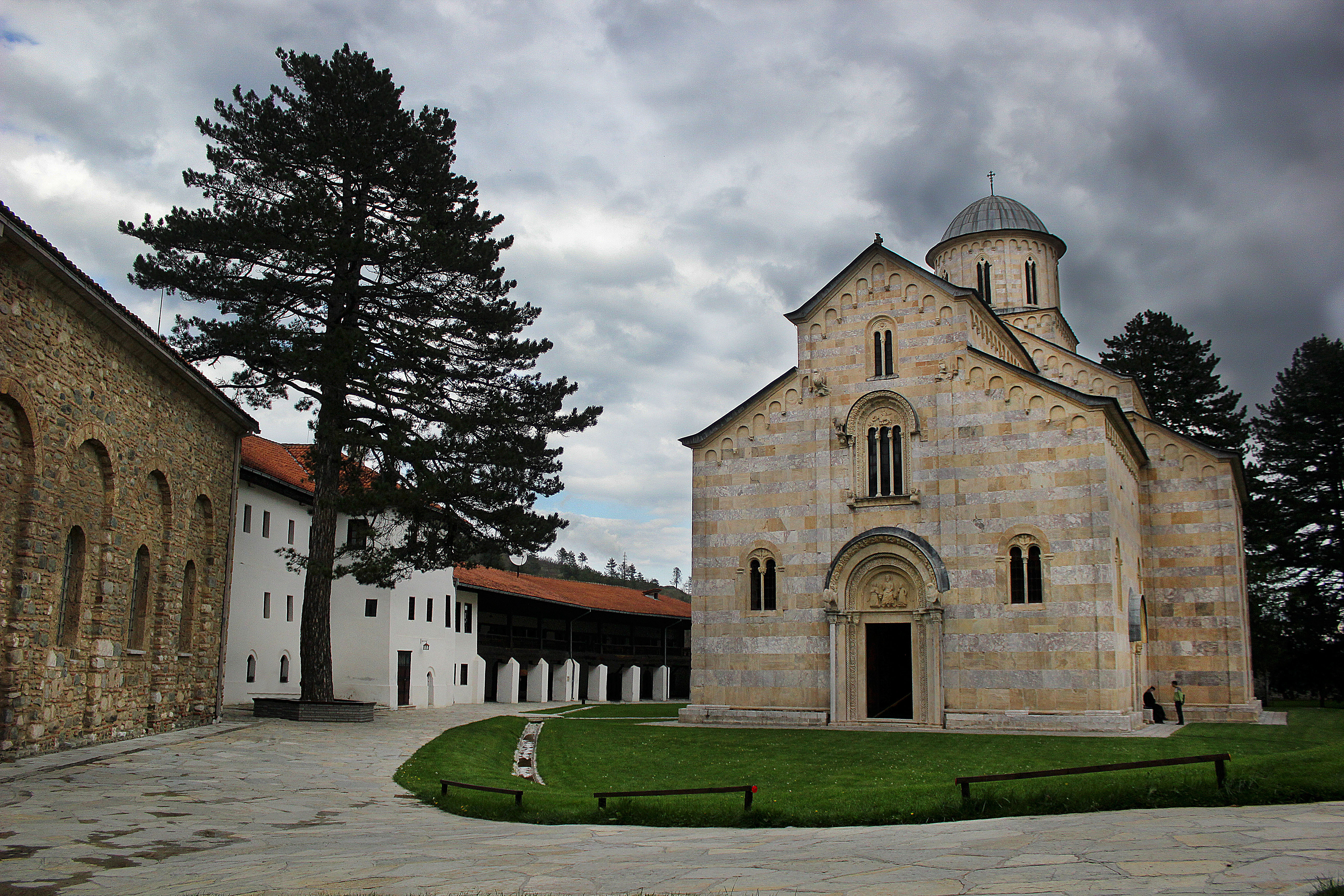 Manastiri i Deçanit